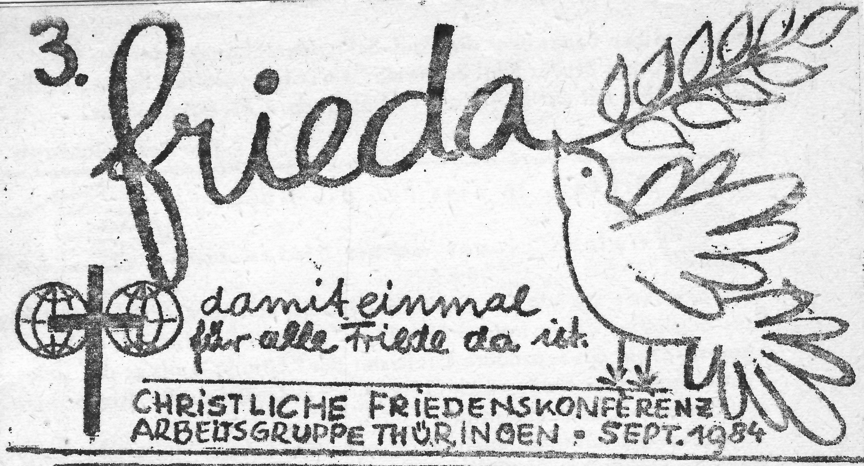 Kopf der CFK-Zeitung Thüringen